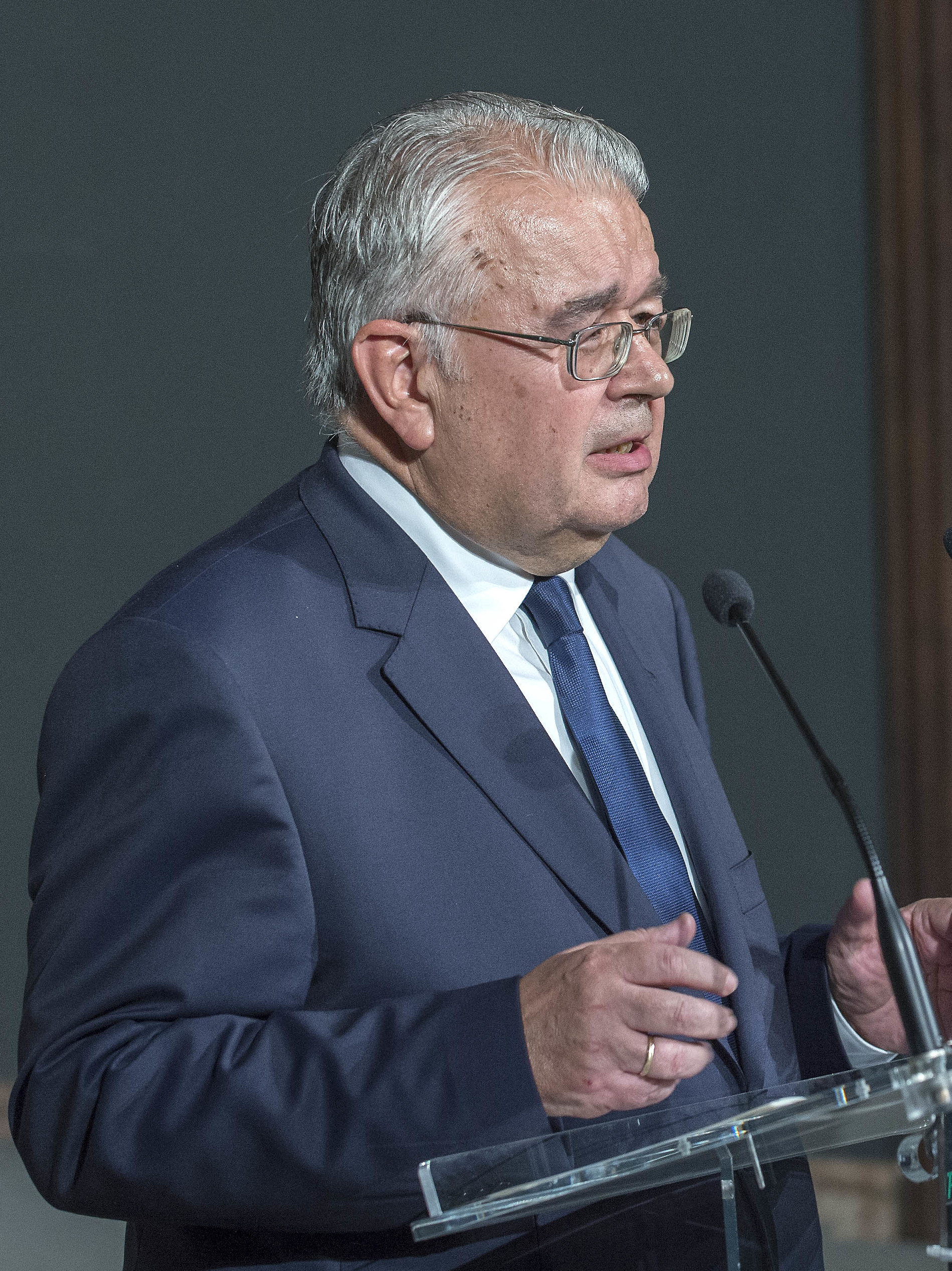 La presidenta de la Junta, Susana Díaz, ha apelado al diálogo y al consenso, porque sólo así, "desde el respeto a las leyes y a la Constitución, podremos conciliar y lograr instaurar un periodo de estabilidad y progreso". Díaz, que ha recibido en San Telmo a los presidentes de los Tribunales Constitucionales (TC) de España, Juan José González Rivas; Portugal, Manuel da Costa Andrade, e Italia, Paolo Grossi, y al del Consejo Constitucional de Francia, Laurent Fabius, ha puesto en valor los tribunales, cortes y salas que imparten justicia constitucional, "elemento esencial para nuestro sistema político y jurídico por su doble función de intérpretes y garantes de la Constitución". Igualmente, Susana Díaz ha celebrado que Sevilla sea la sede para "reflexionar en torno al constitucionalismo en un momento crítico para nuestro país" tras los acontecimientos de Cataluña. Díaz ha reiterado que "Andalucía siempre estará por el cumplimiento y respeto a la legalidad, que les da seguridad y libertad a los ciudadanos, y defenderá el Estado de Derecho". Y en esta tarea, añadió, "es fundamental contar con unos altos tribunales que vigilen y actúen en caso de desviación".